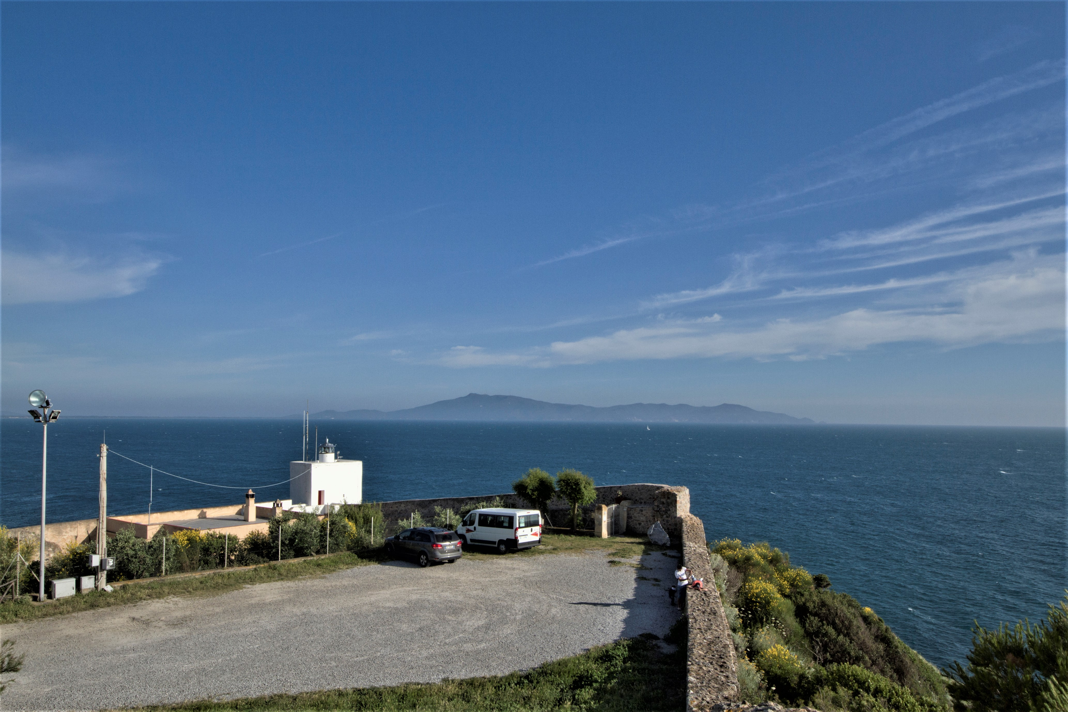 Monte Argentario, Grosseto, Italy